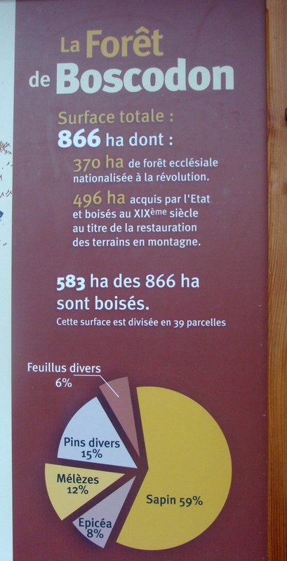 La végétation de la forêt de Boscodon (panneau ONF).